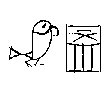 Inkrassing van de naam van farao Ni-Neith op een pot.